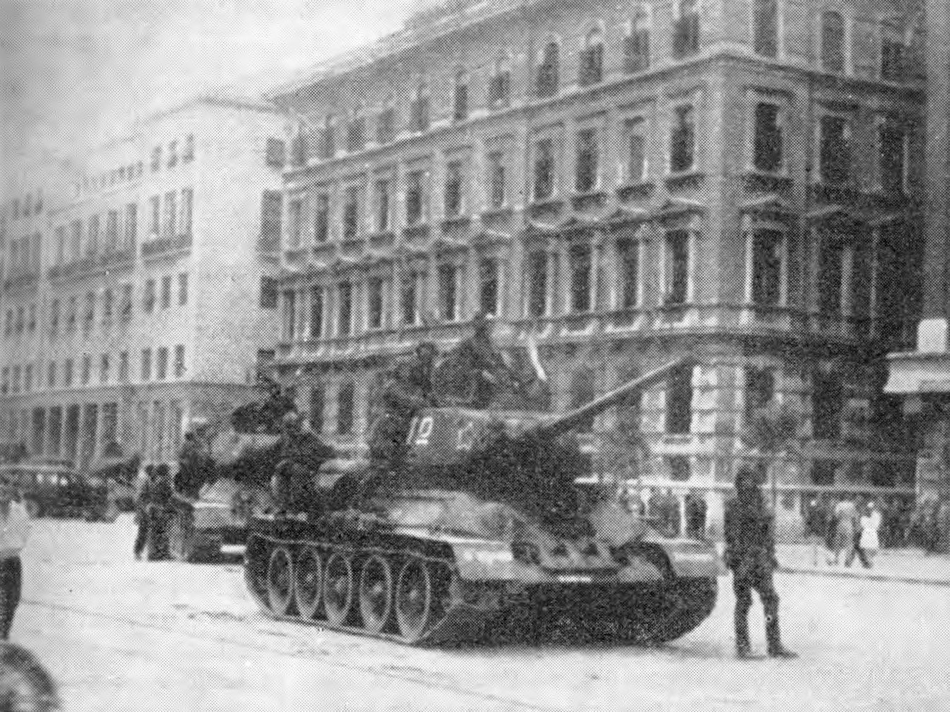 Tanki Jugoslovanske armade v Trstu